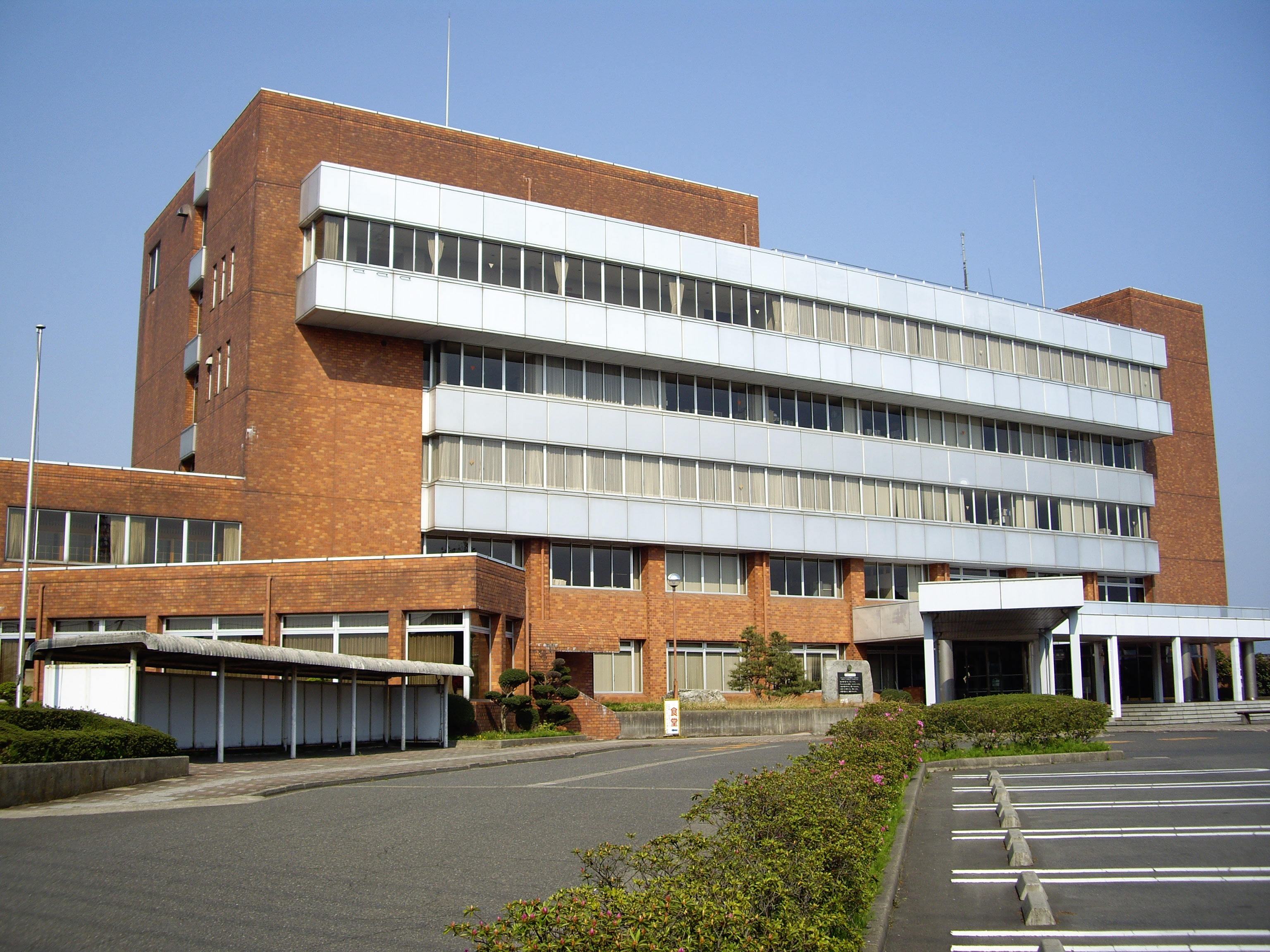 五泉市役所